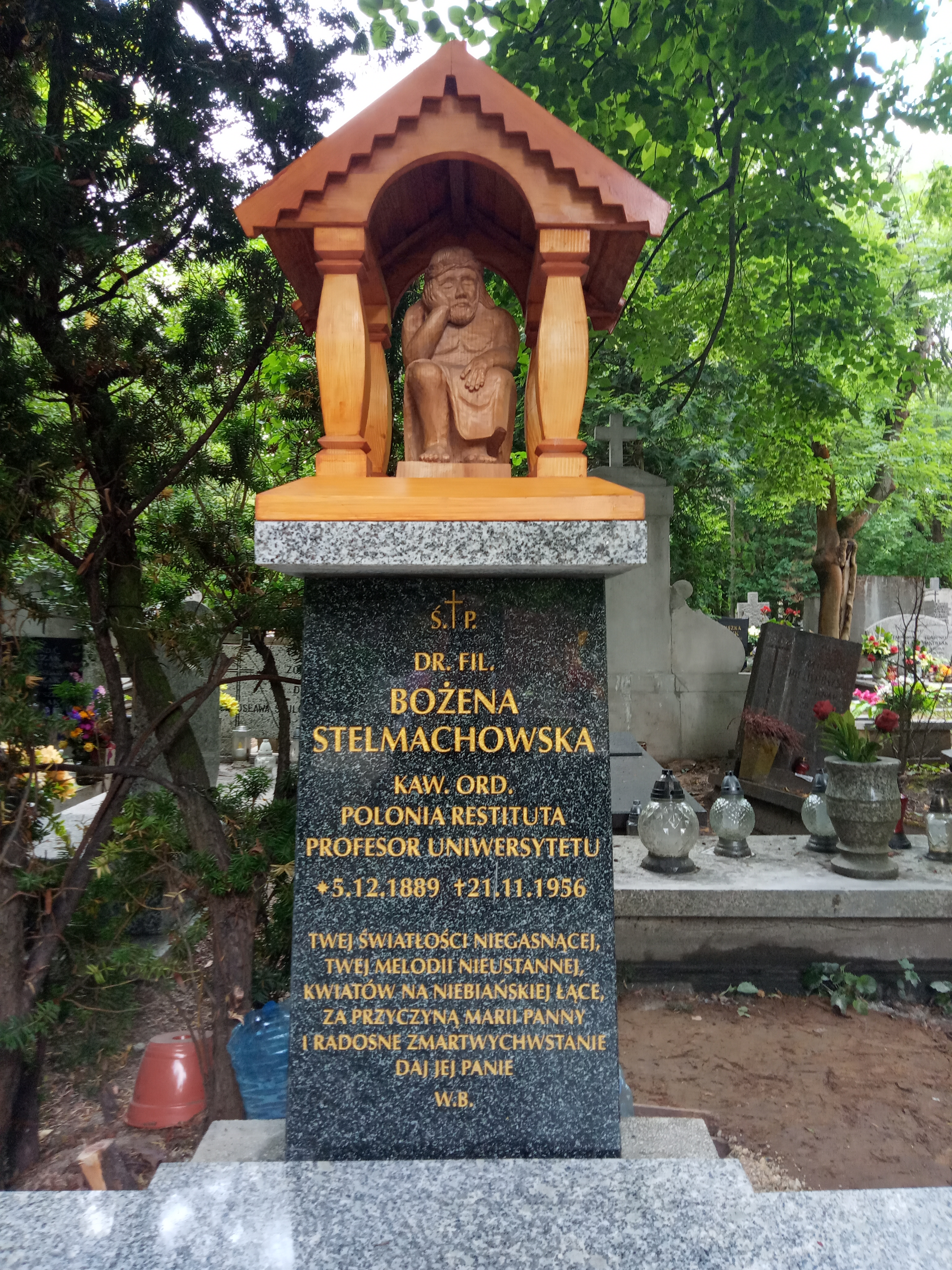 Nagrobek Prof. Bożeny Stelmachowskiej na Cmentarzu Górczyńskim w Poznaniu. rzeźba autorstwa Jana Żoka z Kaszub, kapliczka autorstwa Piotra Perzyńskiego z Poznania